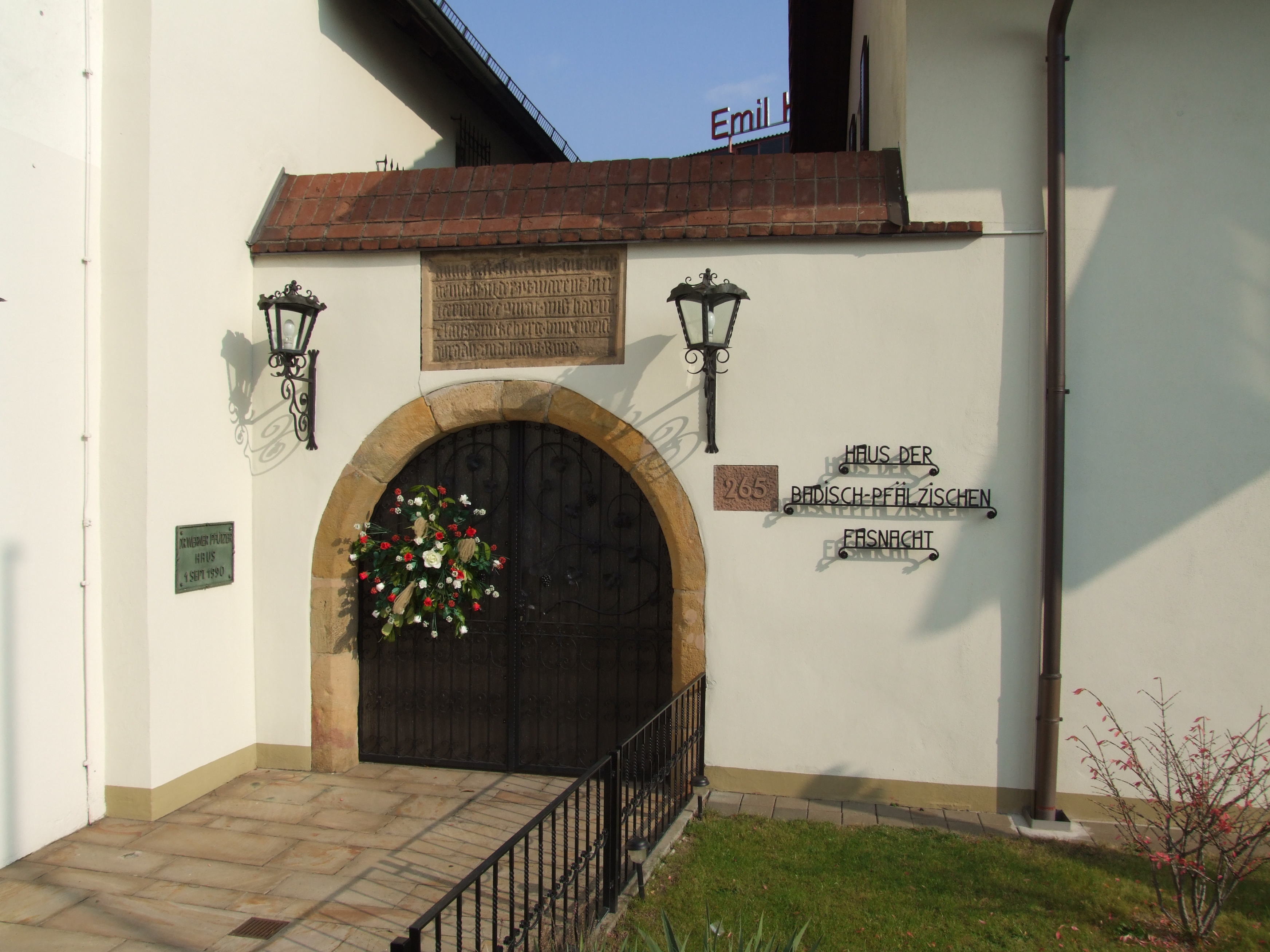 Haus der Badisch-Pfälzischen Fastnacht, Speyer, Eingang